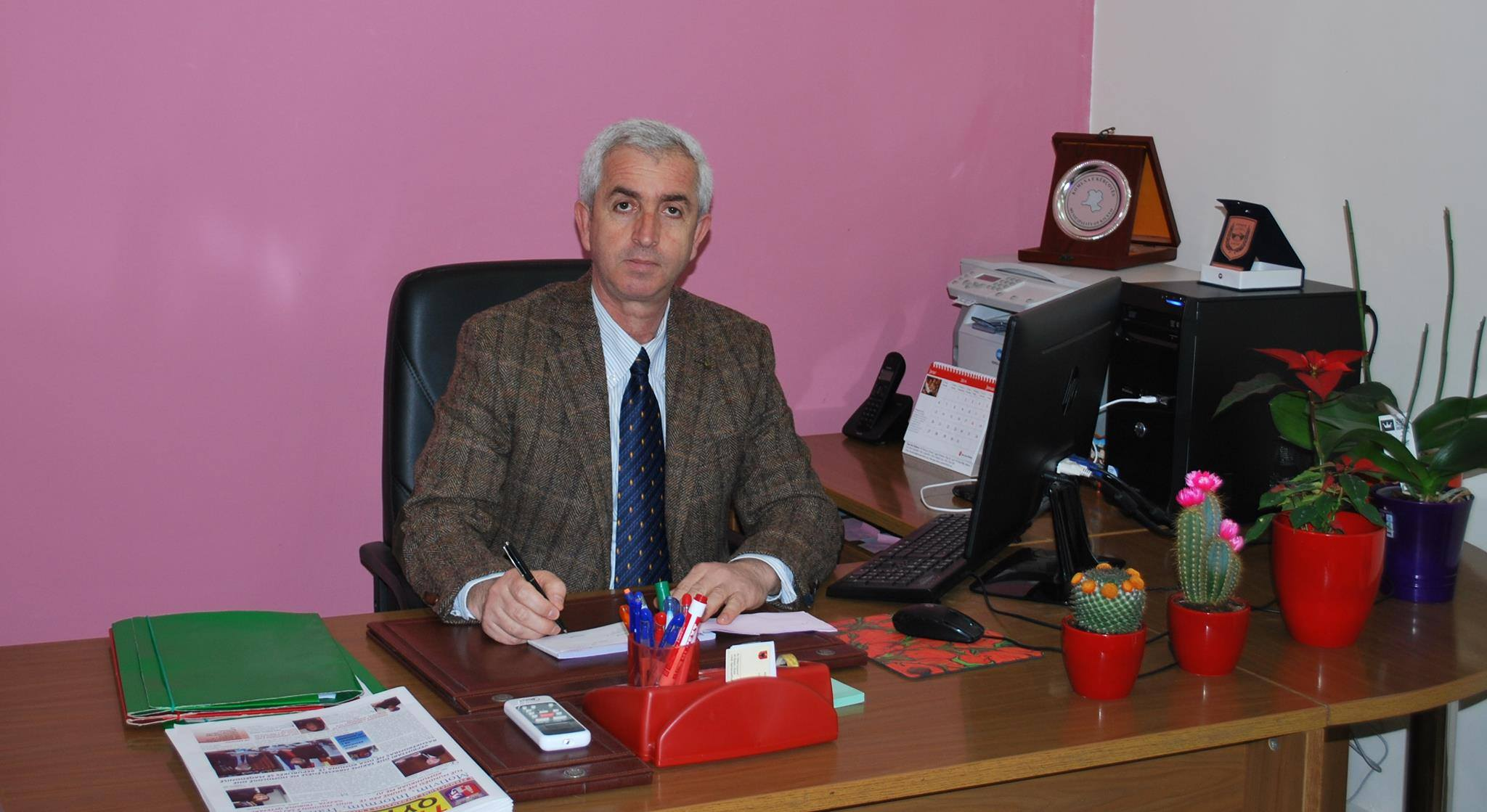 Mayor of Tirana Municipality Nr 1